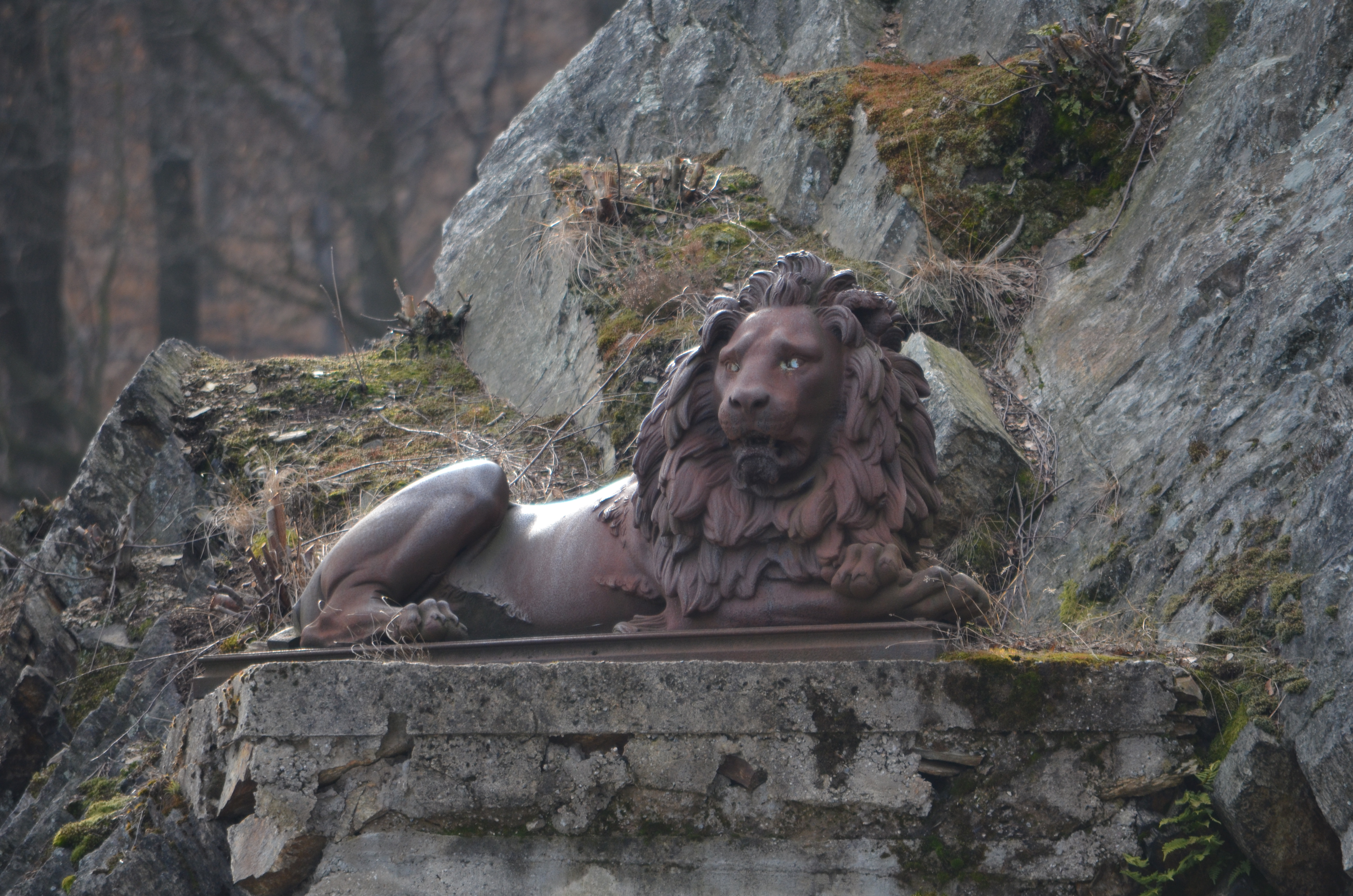 obecnie jest na Zaporze Złotnickiej a jego miejsce to Starościnskie skały